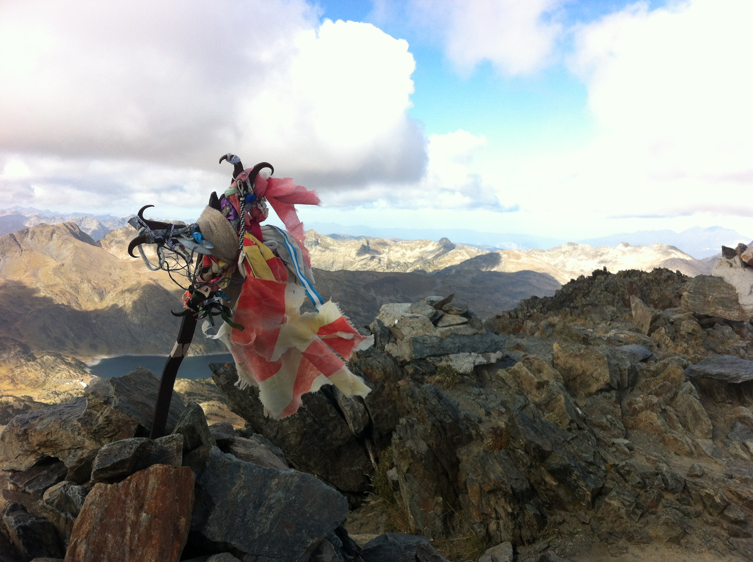 Pic du Carlit - 66 - Pyrennées Orientales - France